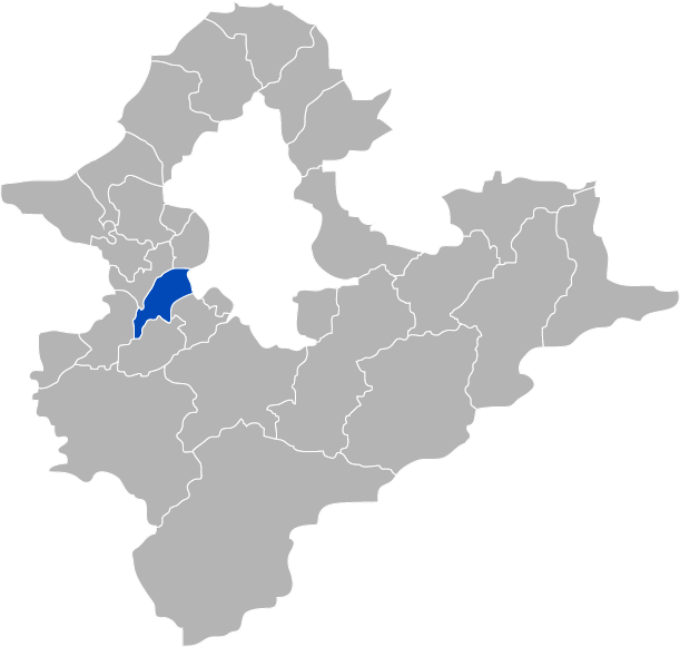 KaurJmeb為編寫中華民國臺灣省臺北縣板橋市，於2005年2月6日所繪。